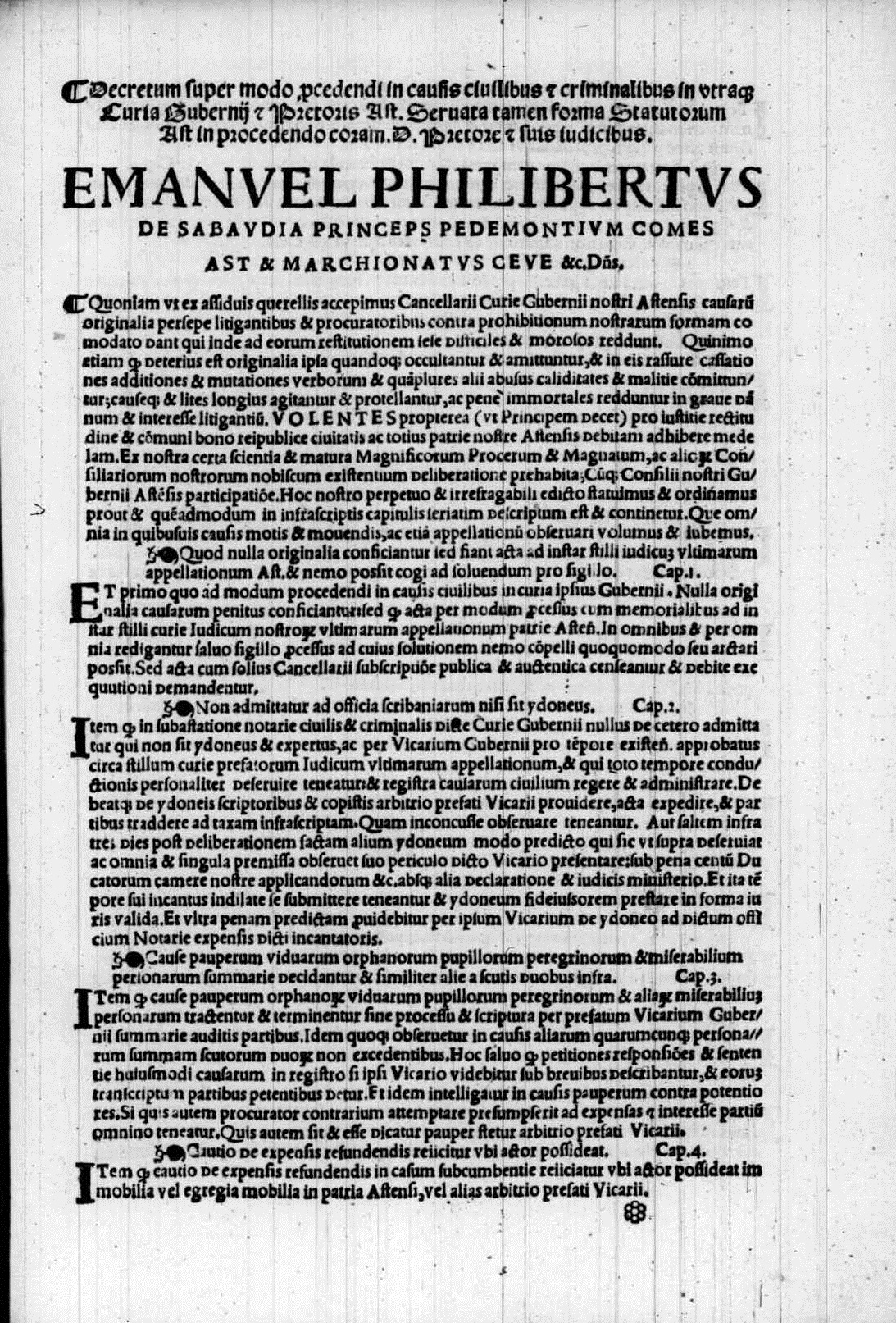 carta fiore 1r